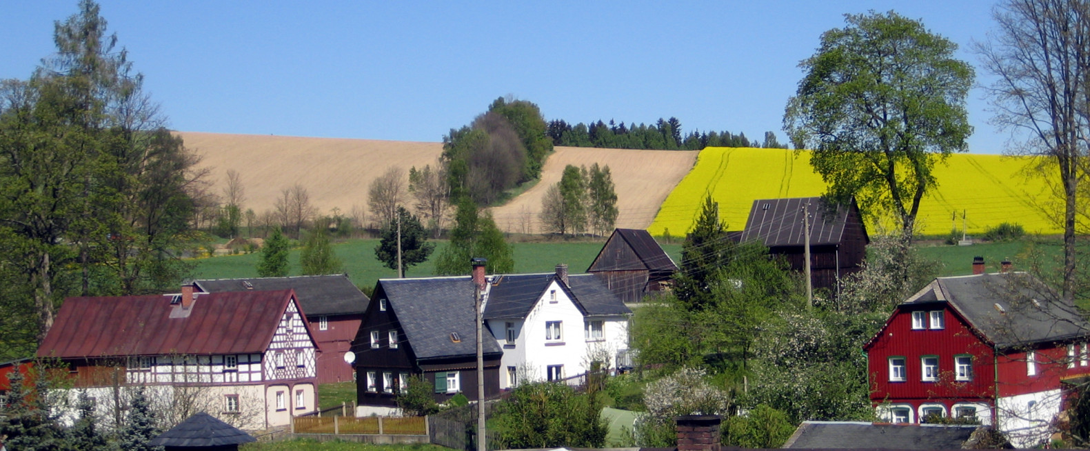 Ortsansicht Raun (Vogtland) - Denkmalschutzgebiet Ortskern Raun